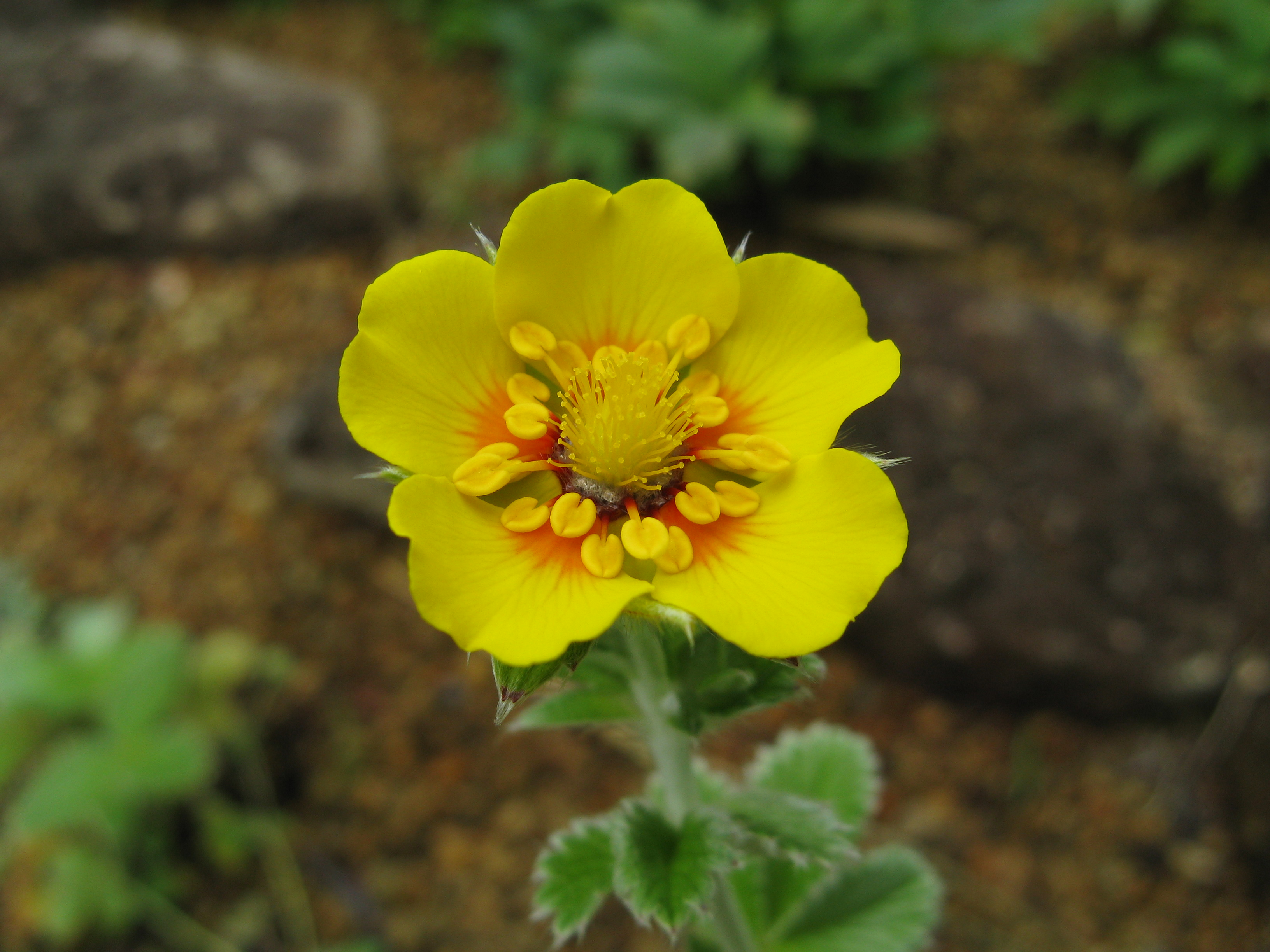 Potentilla megalantha